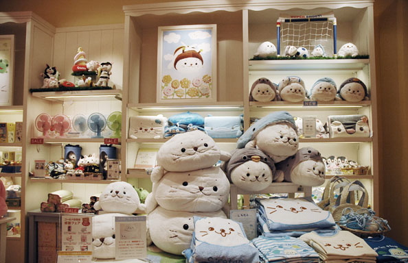 明明人家叫Sirotan @ Oasis 21